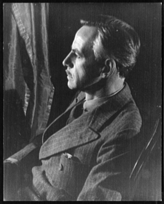 Eugene O'NeillPortrait of Eugene O'Neill